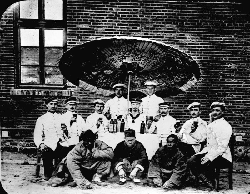 China, Tsingtau, Deutsche Marinemannschaften China, Tsingtau Deutsche Marinemannschaften im Höhenlager Tsingtau